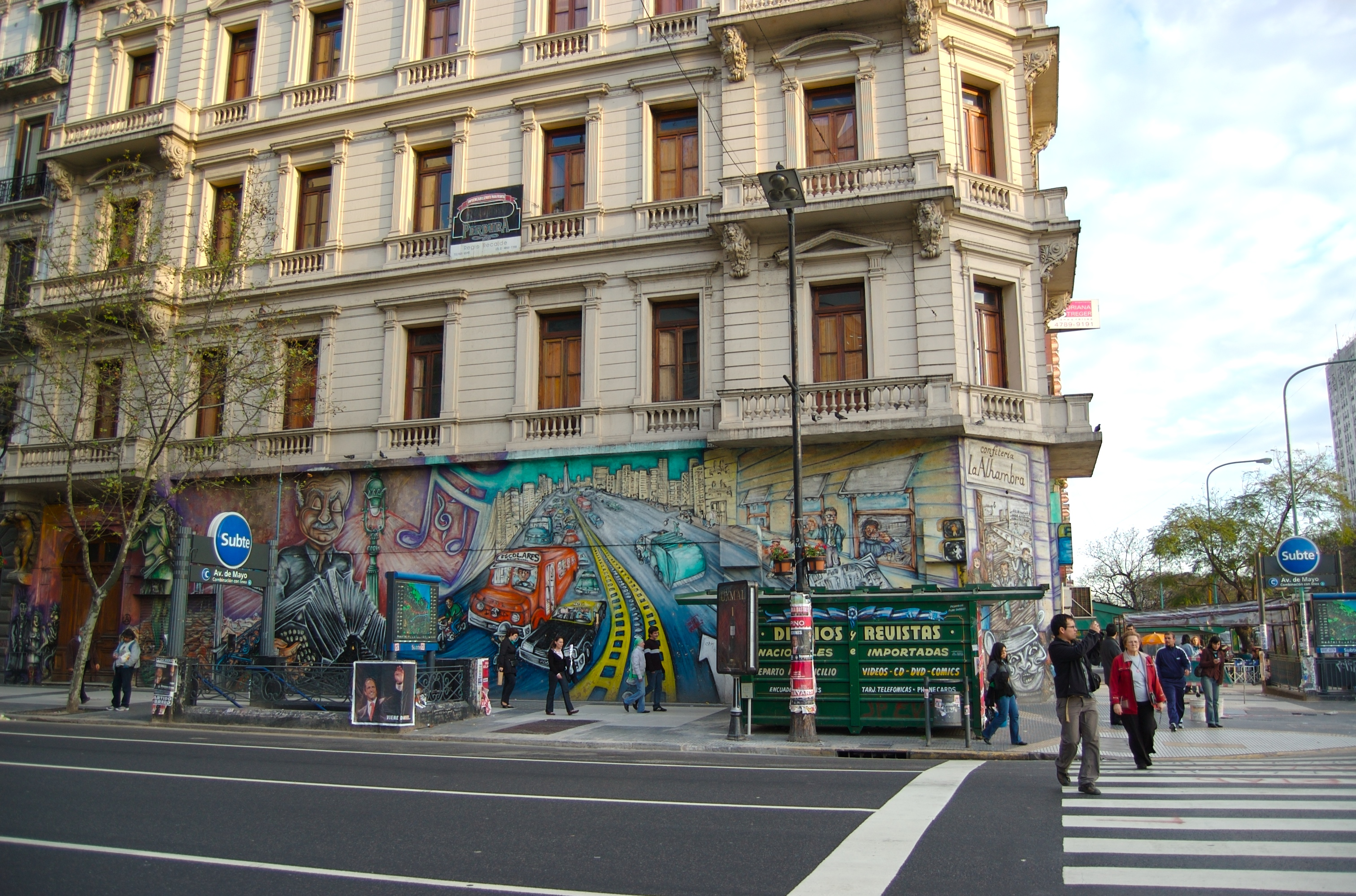 Avenida de Mayo y 9 de Julio, esquina sureste. Buenos Aires, Argentina.